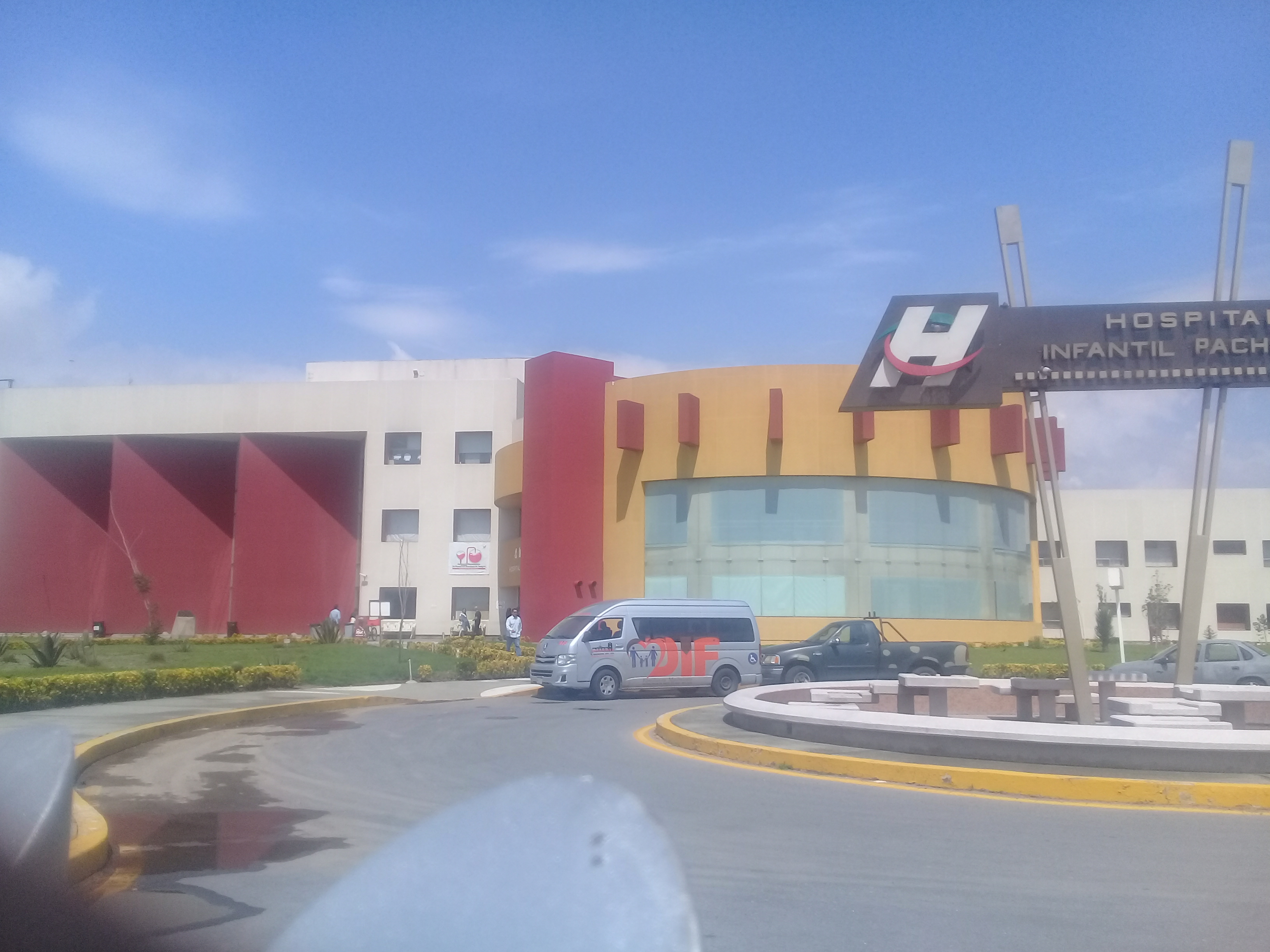 Hospital del Niño DIF María Elena Sañudoen Pachuca de Soto, México. Inaugurado el 25 de marzo de 2010 en un terreno de 36 000 m2 (13 400 m2 de construcción).